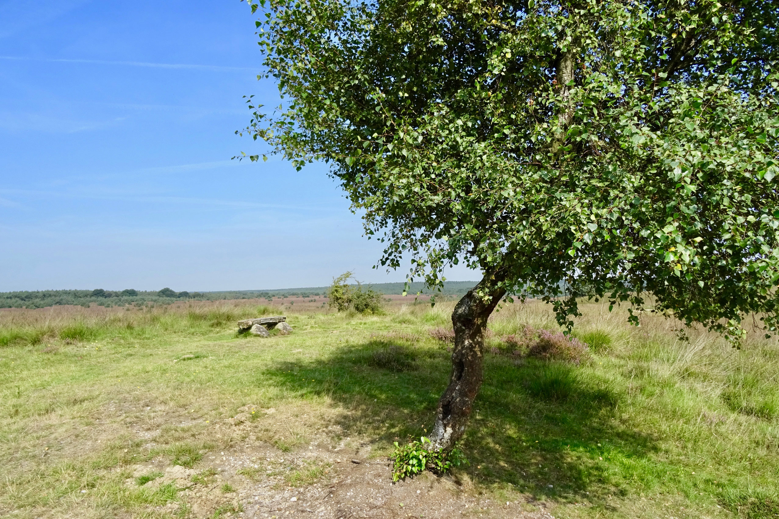 Rheder- en Worth-Rheder heide